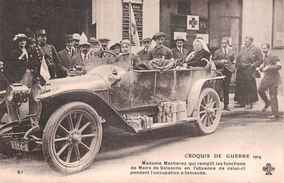 Jeanne Macherez (1852-1930) photographiée en 1914 tandis qu'elle assure la charge de maire de Soissons.